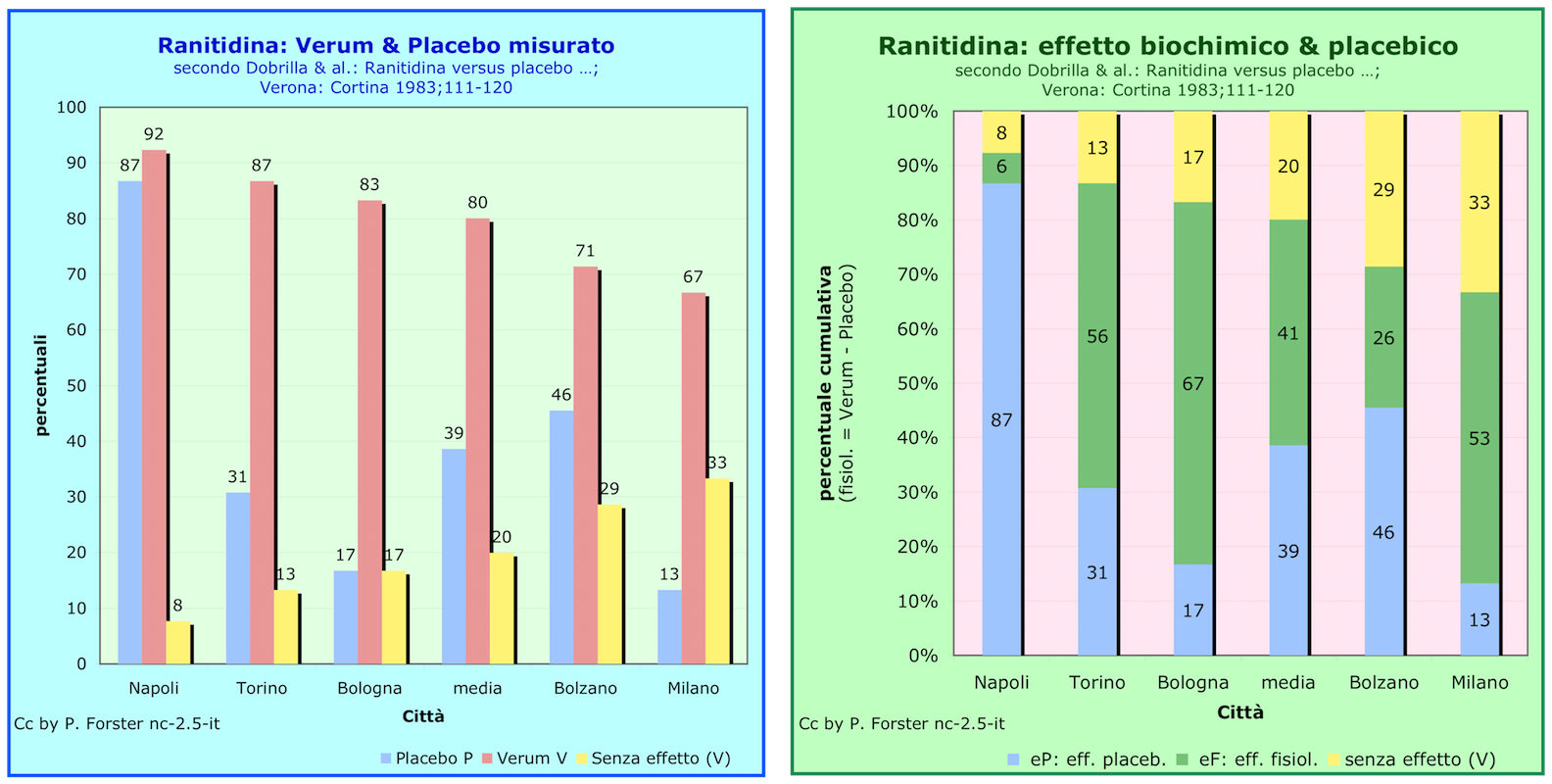 medicina popolare, placebo, placebico, effetto, misurato, rettificato, verum, fisiologico, ranitidina, ulcera, gastriche, duodenali, città, italiane